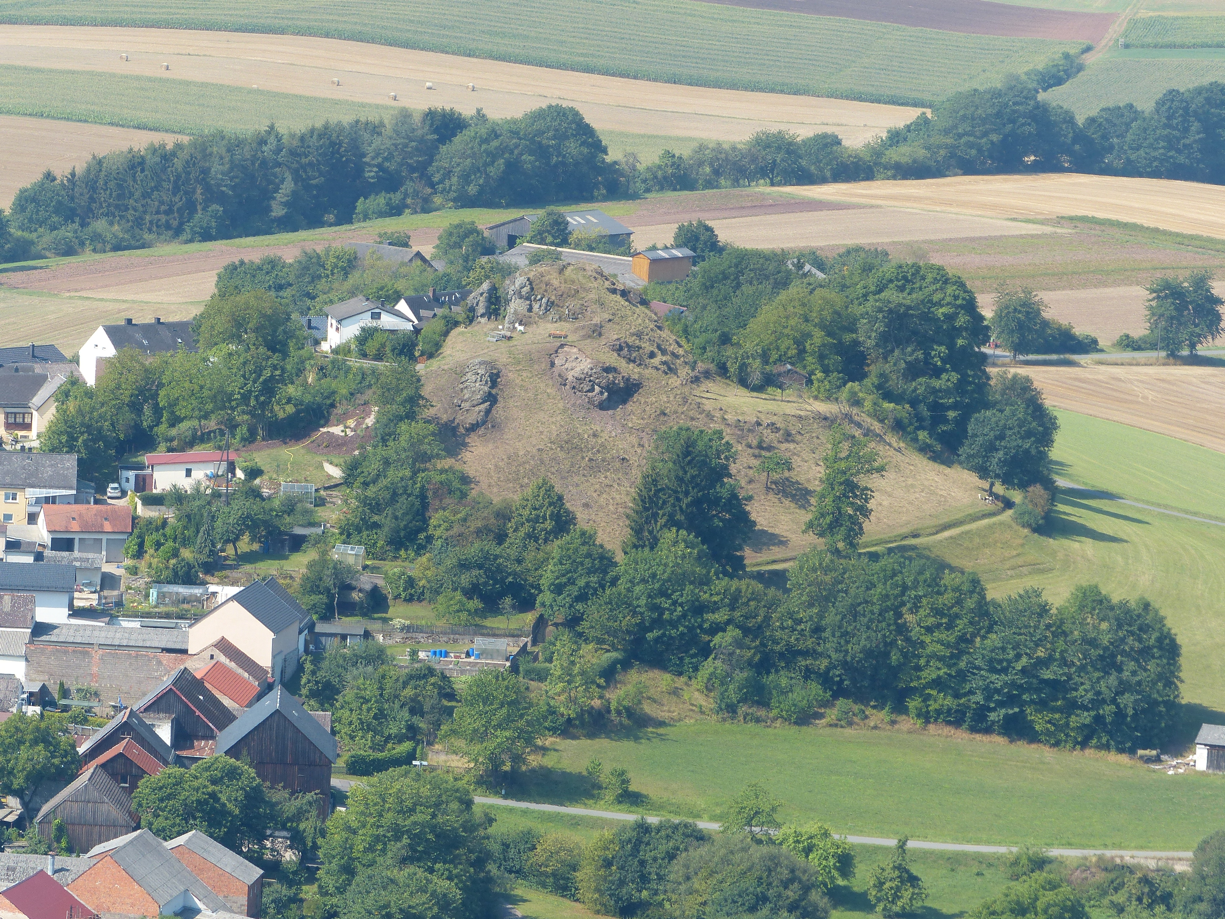 Ansicht von Neustadt am Kulm